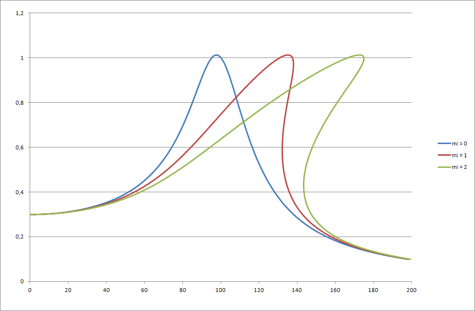 Krzywe rezonansowe nieliniowego układu drgań w zależności od współczynnika nieliniowości